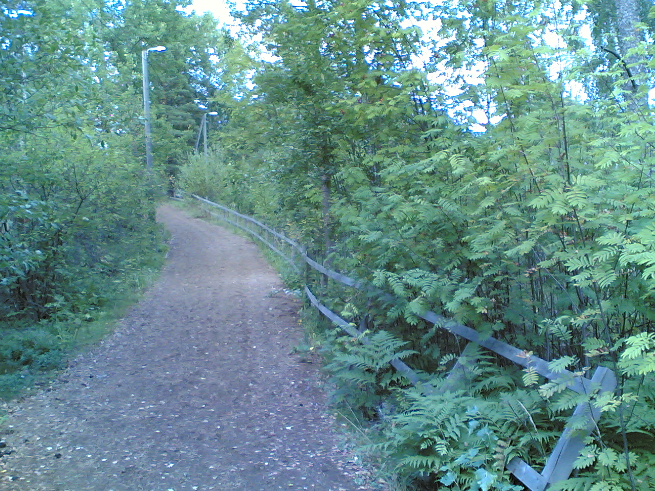 Herttoniemen pururata